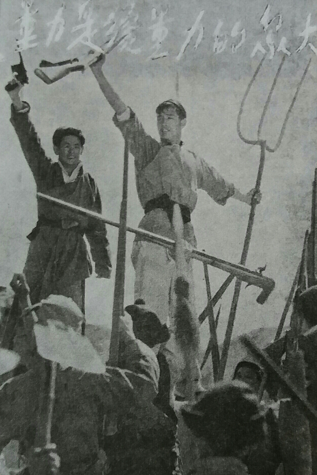 壮志凌云剧照